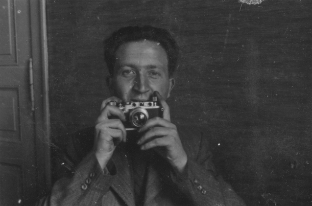 Mendel Grossman